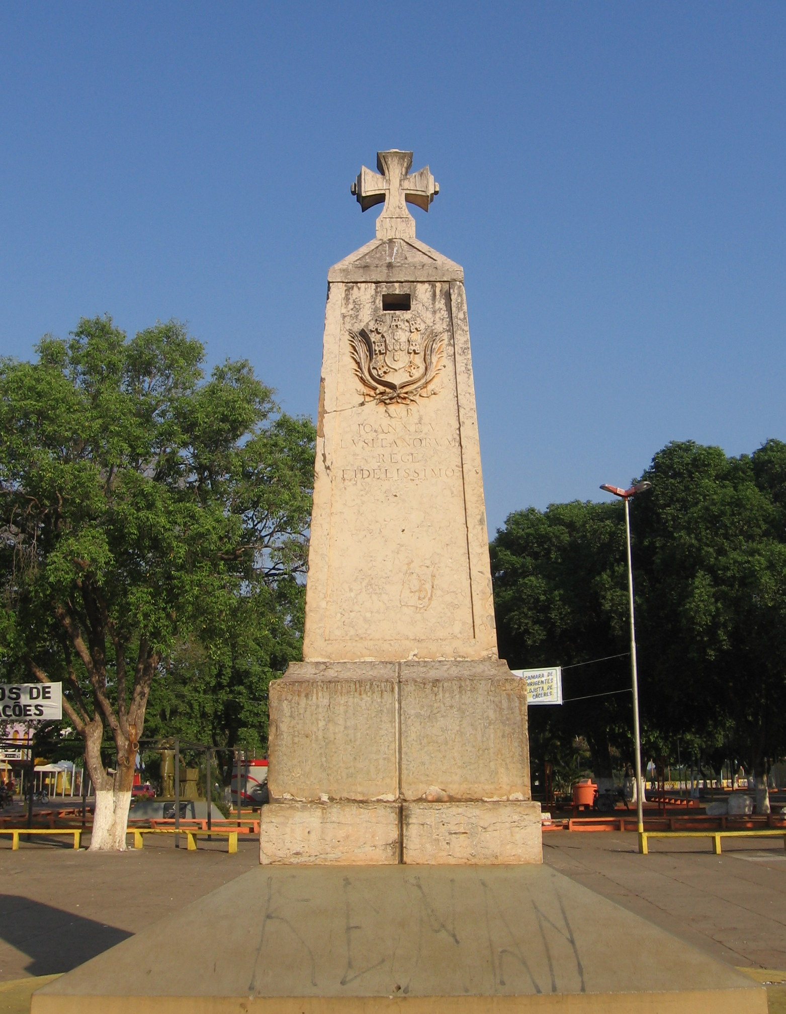 O Marco do Jauru (o da foto, exposto na Praça Barão do Rio Branco, ou simplesmente Praça Barão, como é conhecida em Cáceres, é uma réplica do original), representava a fronteira entre os territórios portugueses e espanhóis, demarcados a partir do Tratado de Madri de 1750. Foi assentado originalmente na Foz Rio Jauru.